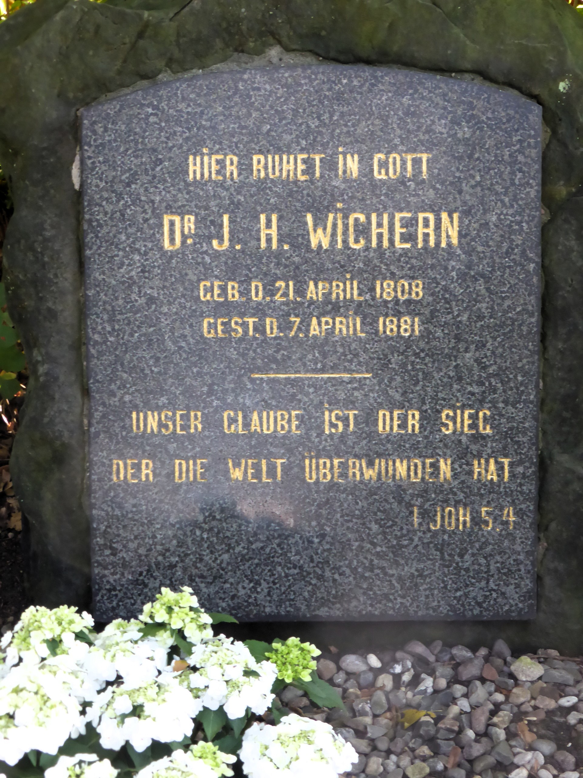 Grabstein von Johann Hinrich Wichern, Alter Hammer Friedhof